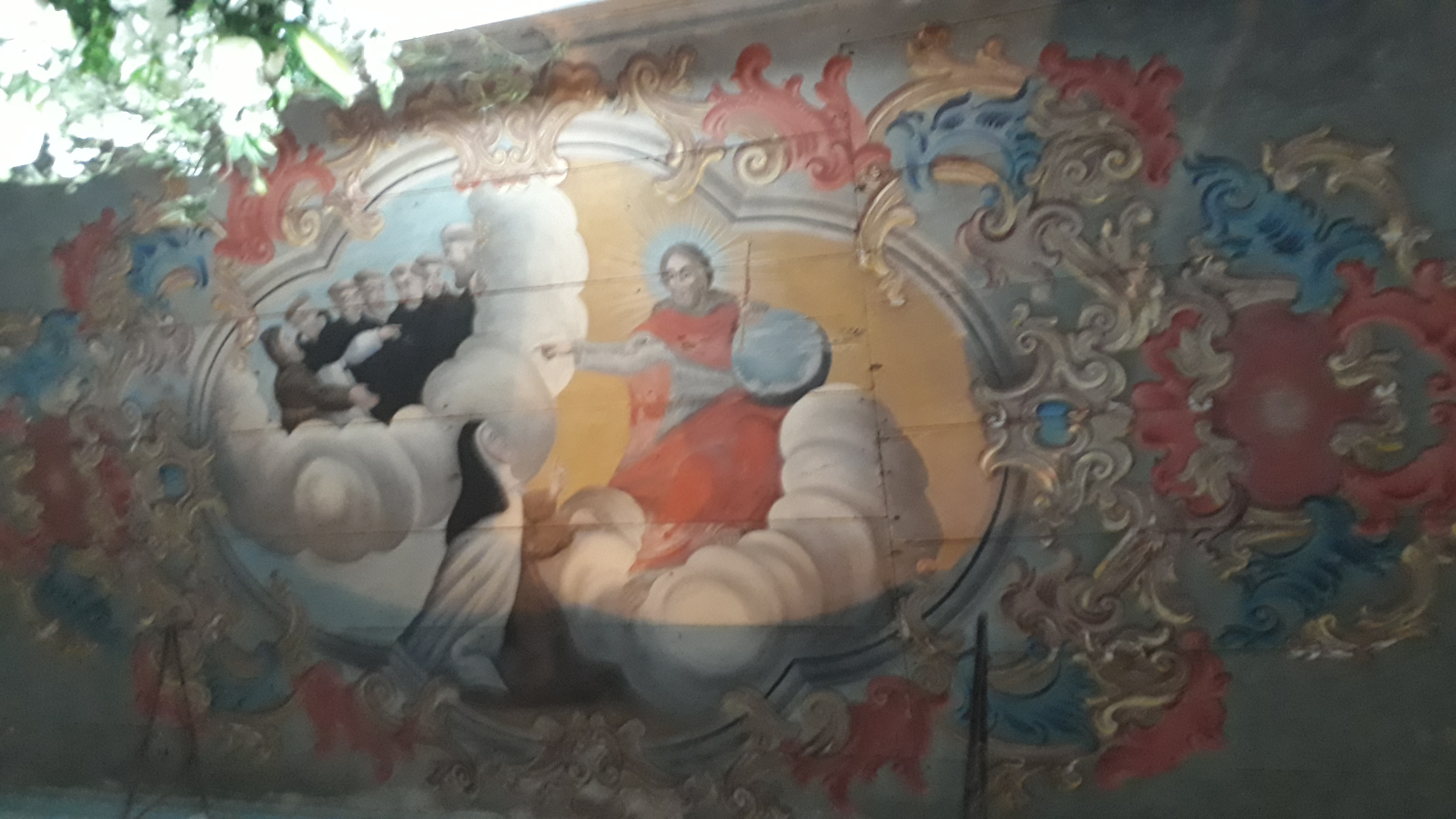 É o teto da Igreja de Santa Teresa de Jesus da Ordem Terceira do Carmo, em João Pessoa Paraíba, é anexa a igreja de Nossa Senhora do Carmo, em João Pessoa.